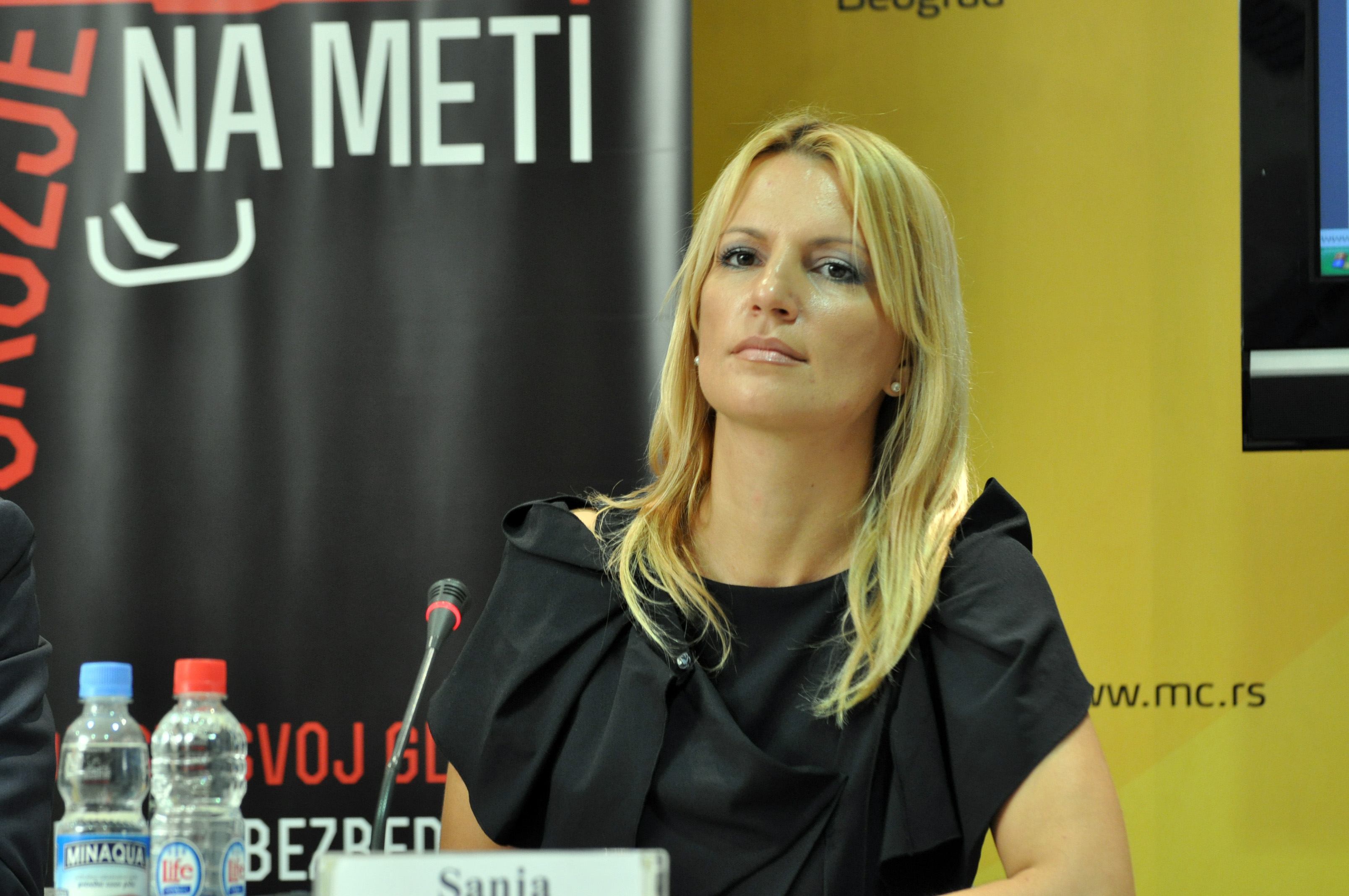 Ova slika je slika TV voditeljke Sanje Radan sa Medija centra